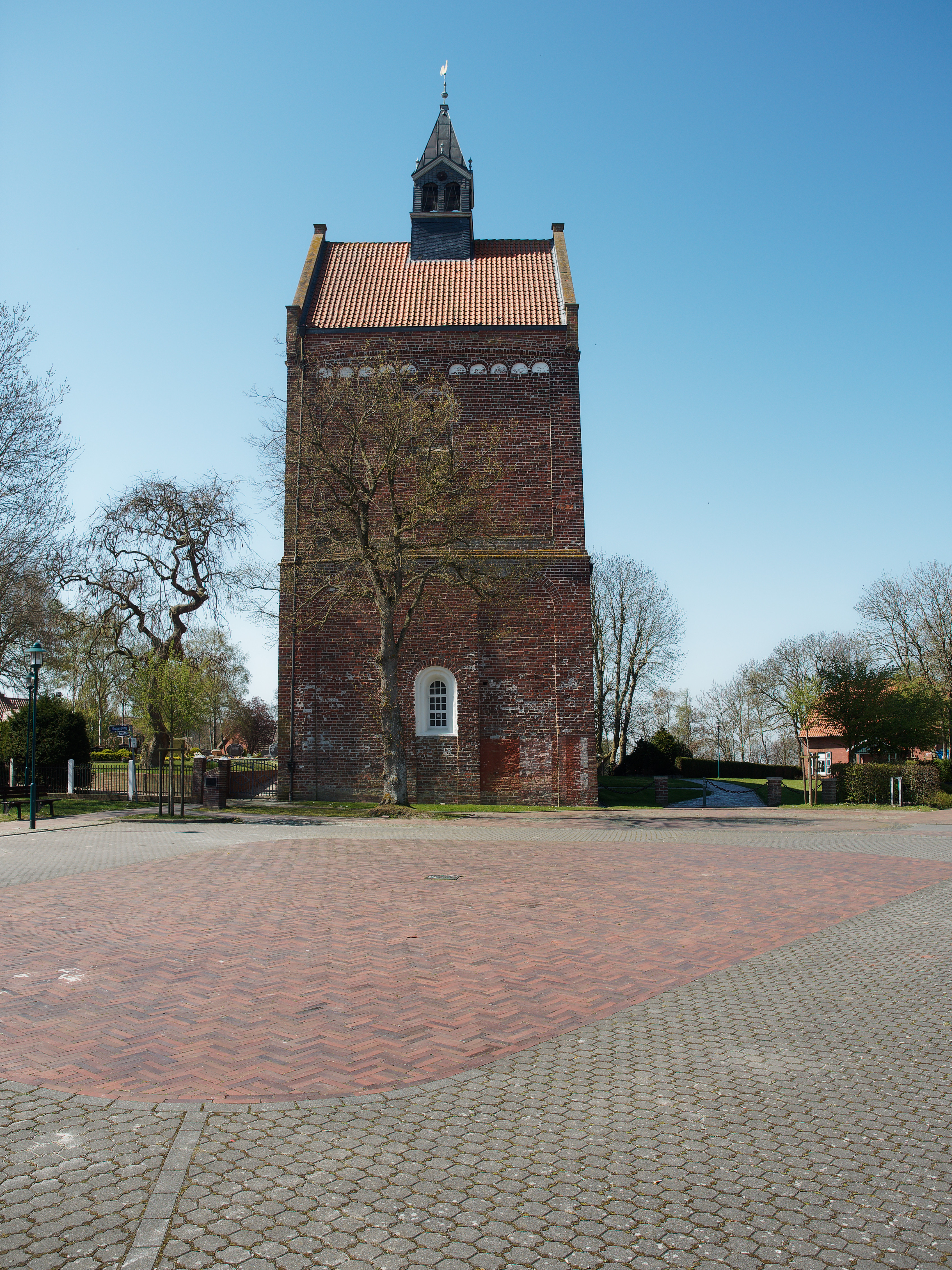 Turm der evangelisch reformierten Kirche in Eilsum (Ostfriesland). Ansicht von Nordosten.